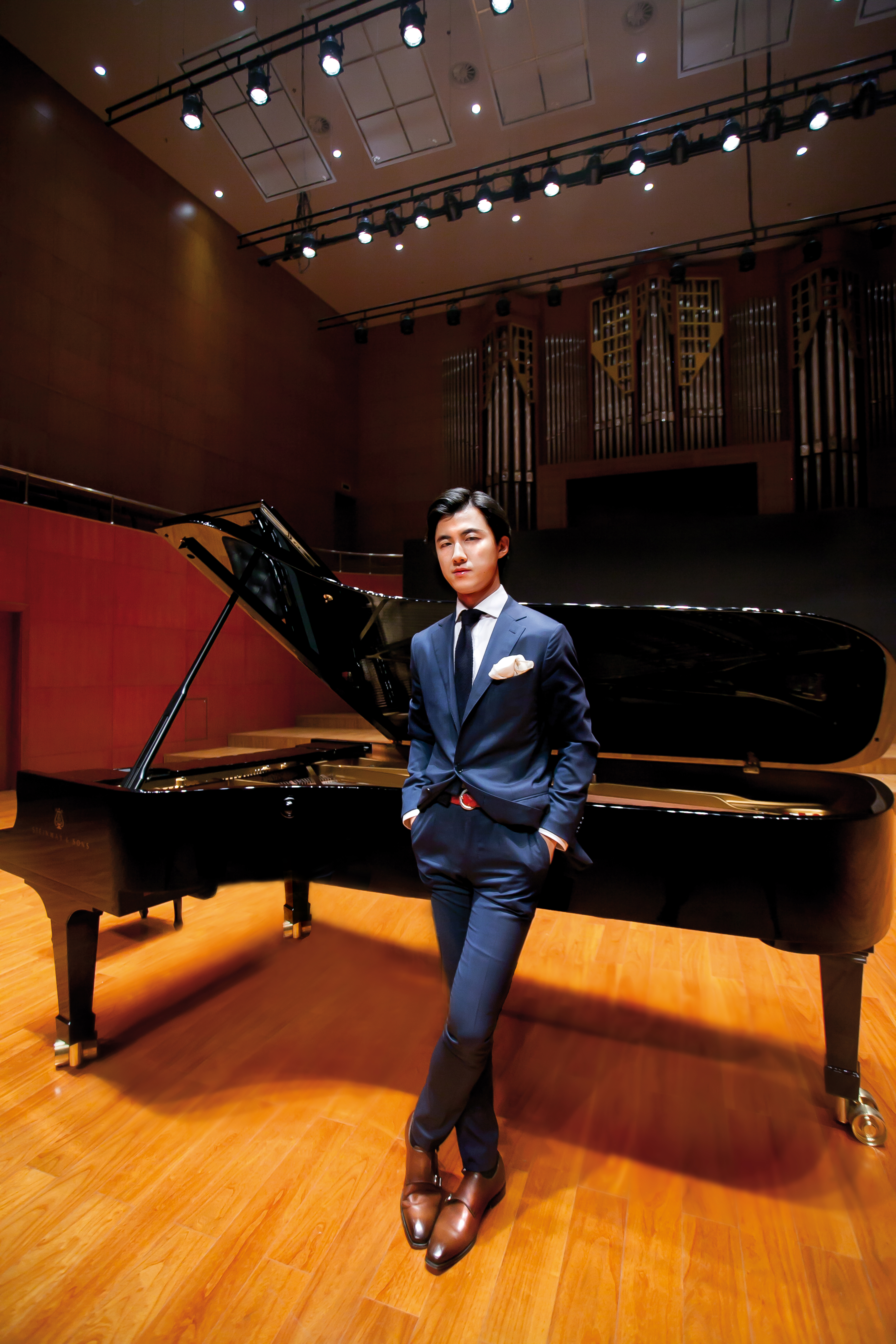 Haiou Zhang portrait